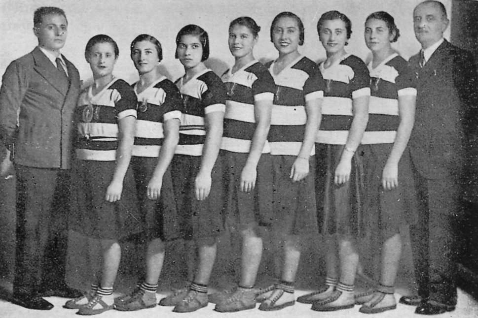 La squadra di basket femminile della Canottieri Milano campione d'Italia 1934. Da sinistra a destra: l'allenatore Ghirimoldi, Pia Cavallotti, Marisa Cavallotti, Ilda Colombo, Bruna Bertolini, Nerina Bertolini, Matilde Moraschi, Olga Campanati e il Presidente Hülls.